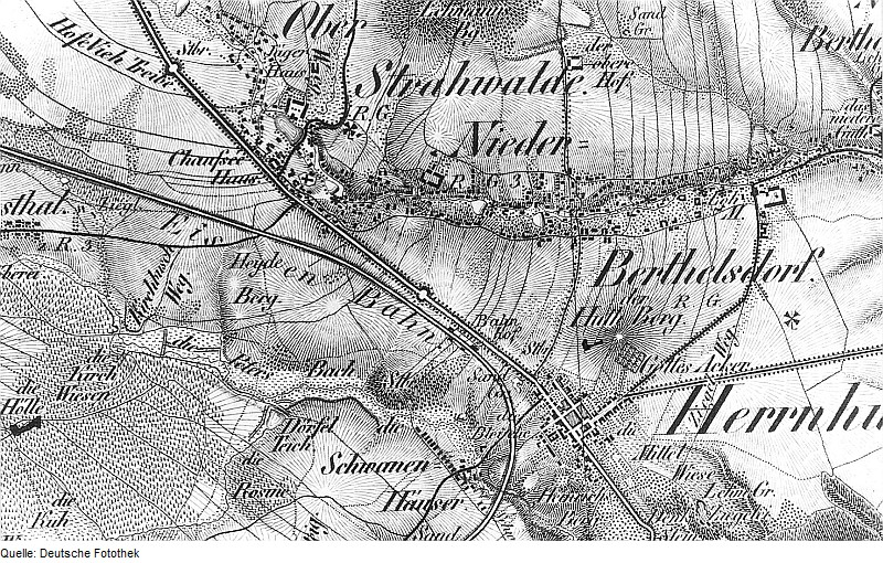 Original image description from the Deutsche Fotothek Strahwalde. Oberreit, Sect. Zittau, 1844/46